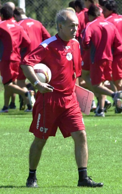 Alejandro Sabella, durante un entrenamiento al asumir la conducción técnica de Estudiantes de La Plata, equipo con el que se consagró campeón de la Copa Libertadores de América 2009 y del Torneo Apertura 2010 del fútbol argentino.